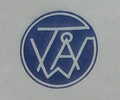 Turun Vanun logo